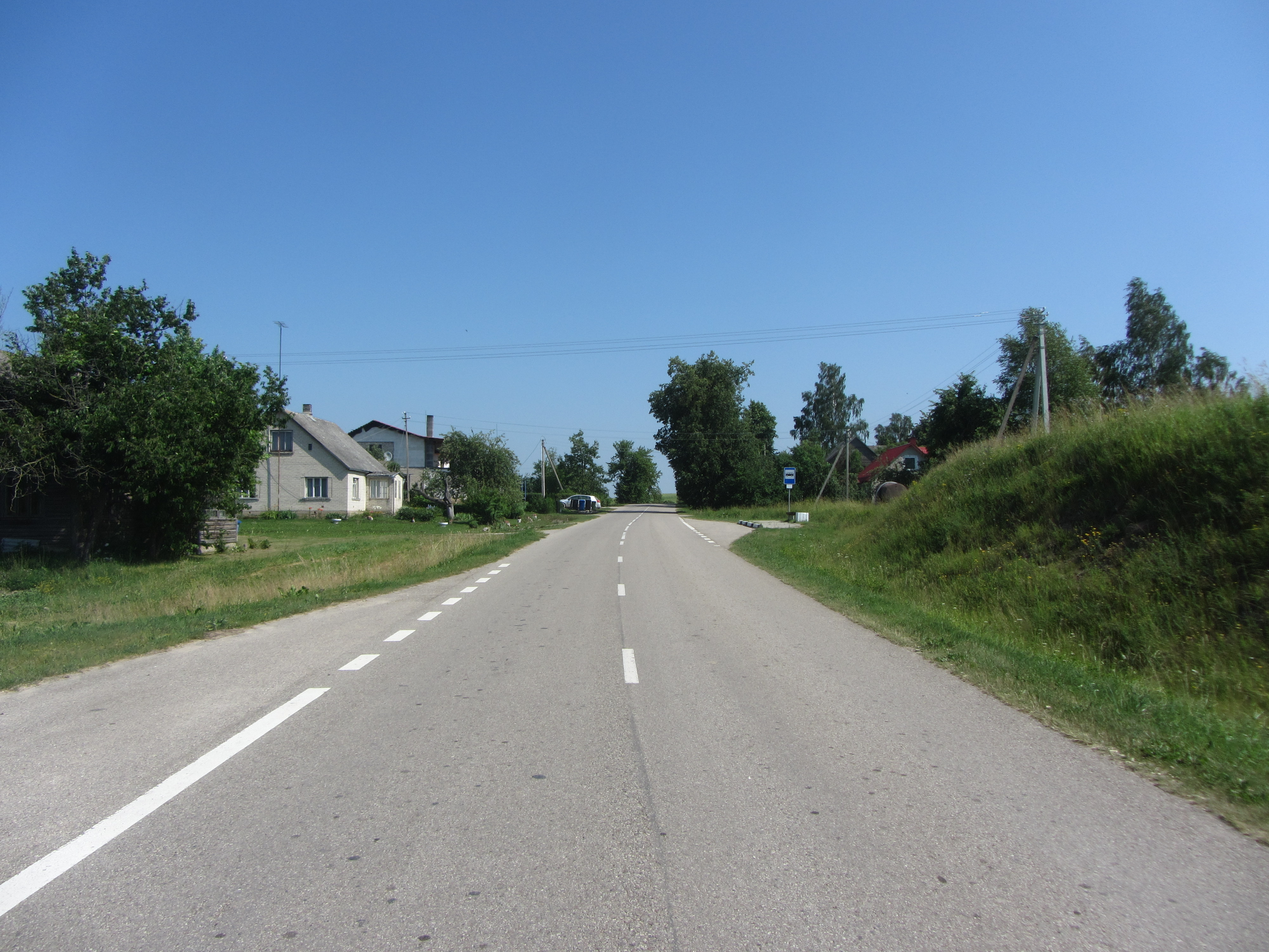 Mikyčiai 67206, Lithuania